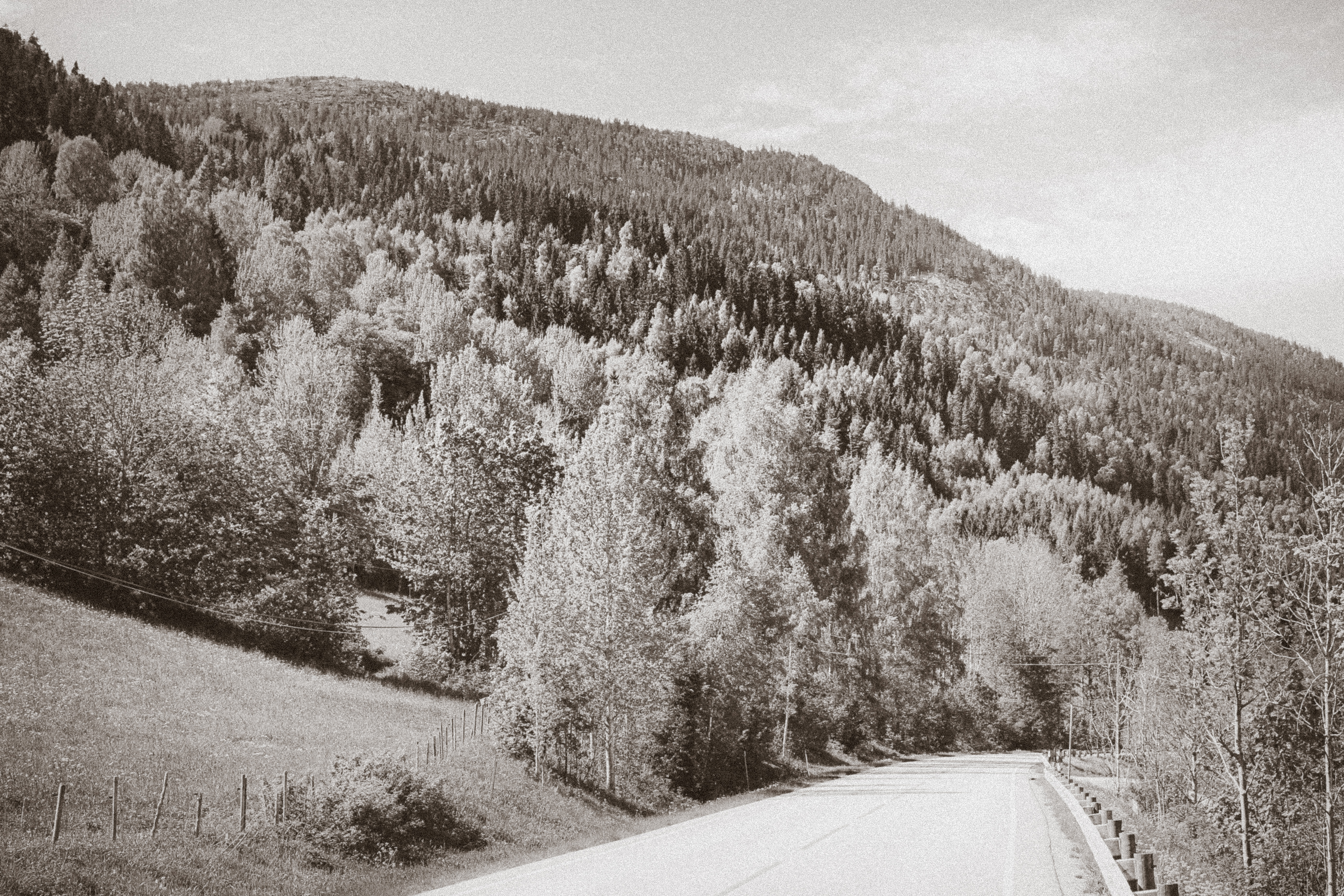 Skreiberga eller Skreiaberga sett fra Feiring